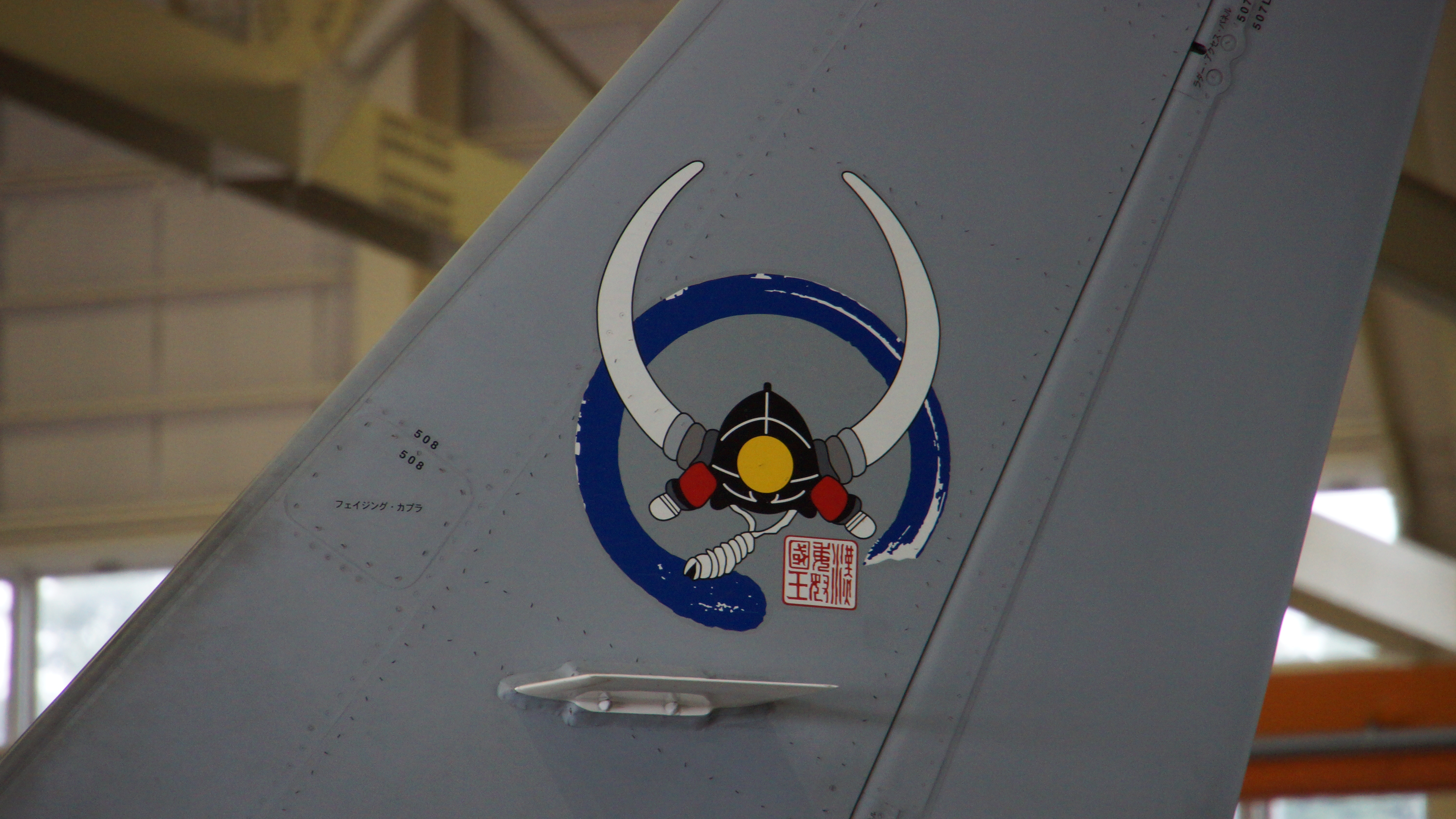 航空自衛隊 T-4練習機（46-5721号機） 垂直尾翼に描かれた西部航空方面隊司令部支援飛行隊部隊章。2017年11月26日 築城基地にて。